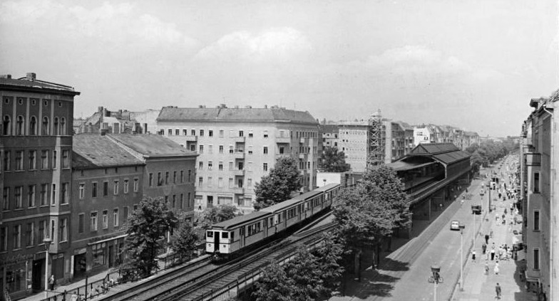 Berlin, Schönhauser Allee, Hochbahnhof Zentralbild Weiß Me 11.6.60 Berlin, Juni 1960 Blick in die Schönhauser Allee mit Hochbahnhof.